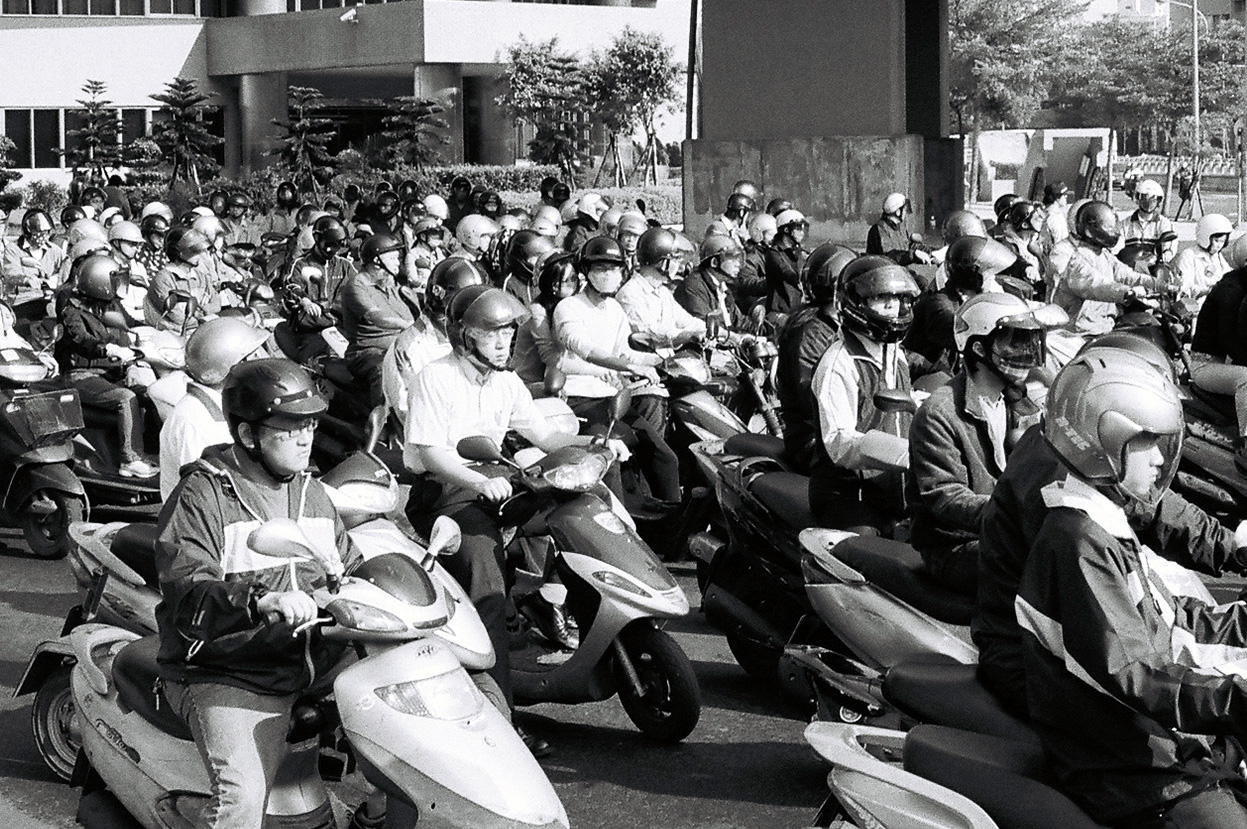 Nikon FM1, TRI X 400